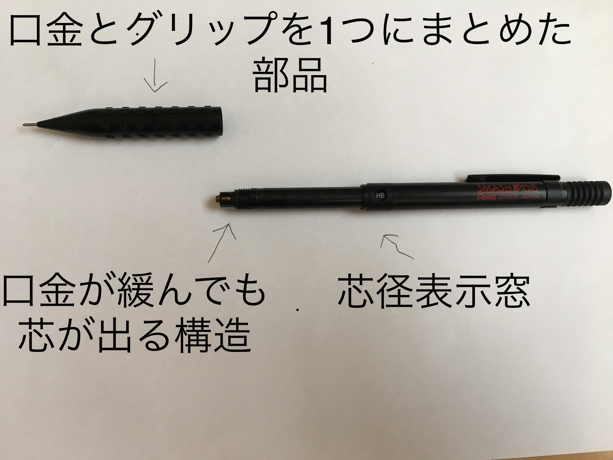 SMASHの内部構造です